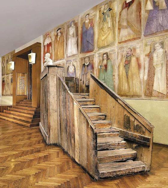 Catedra Galileo en la Sala de los Cuarenta en el Palacio Bo de Padua